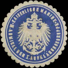 Sealing stamp Title: K. Marine II. Admiral der I. Aufklärungsgruppe Description: Place: size: cm